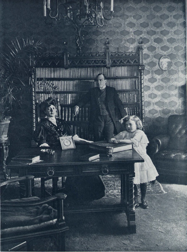 Der deutsche Opernsänger und Filmschauspieler Franz Egenieff (eigentlich: Marian Eberhard Franz Emil von Kleydorff) mit seiner Ehefrau Paula, geb. Busch, aufgenommen 1906 (oder früher).